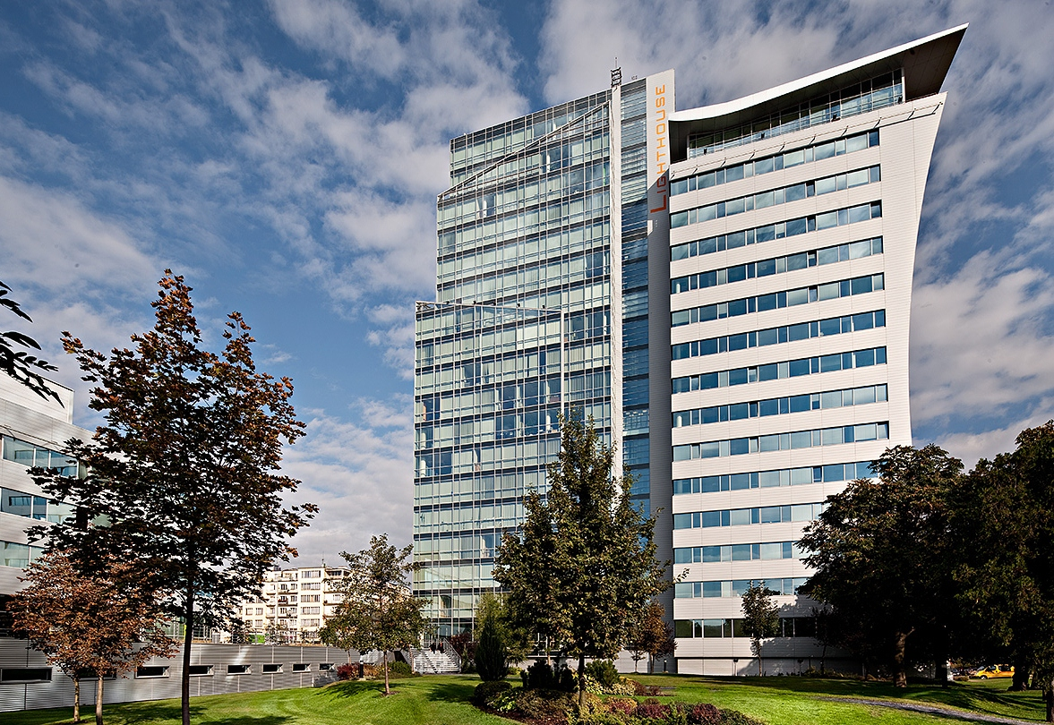 ilustrační foto ISCARE